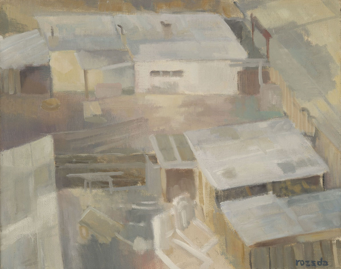 Rozsda Endre - Pál utcai fiúk